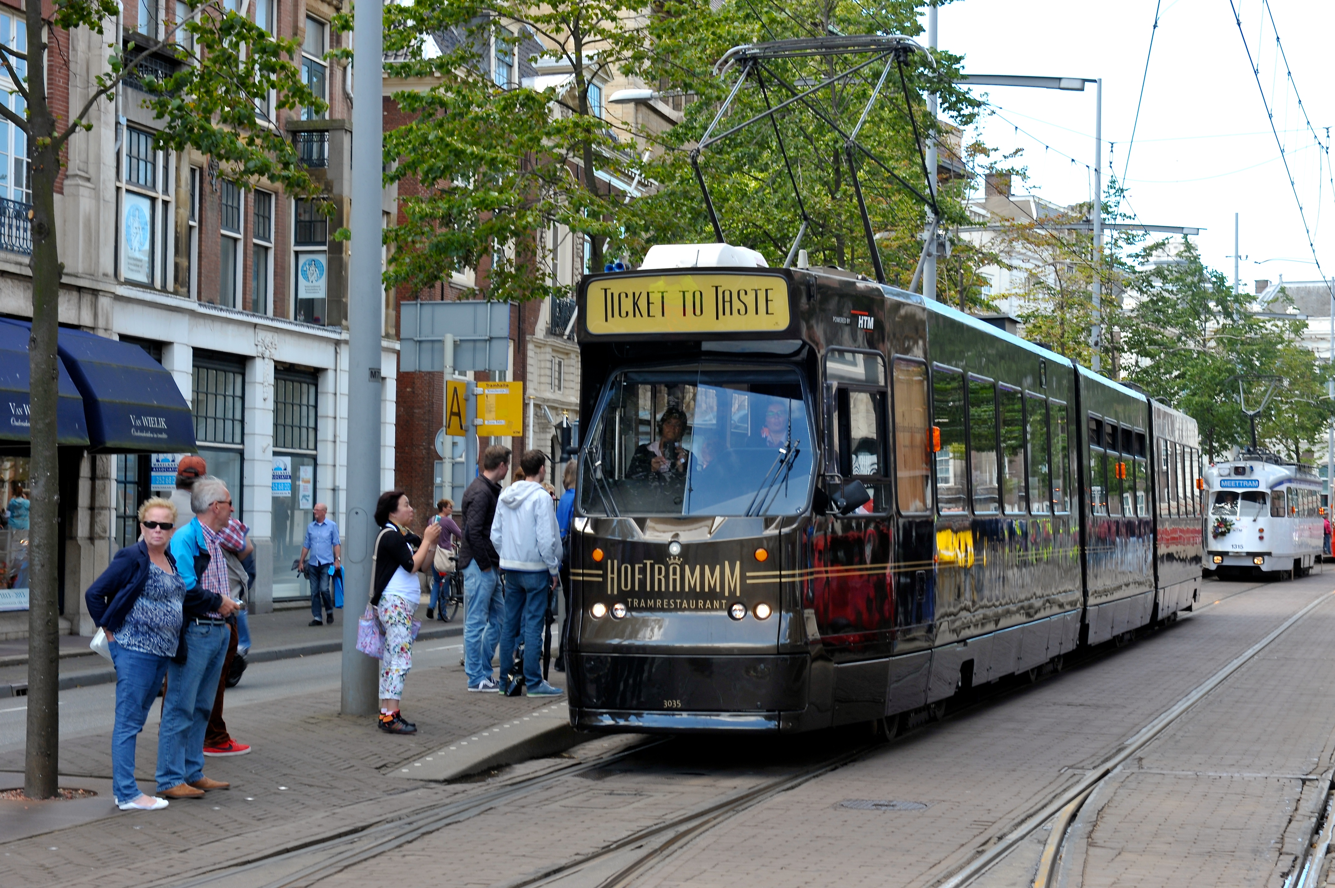 Hoftrammm / Tramrestaurant